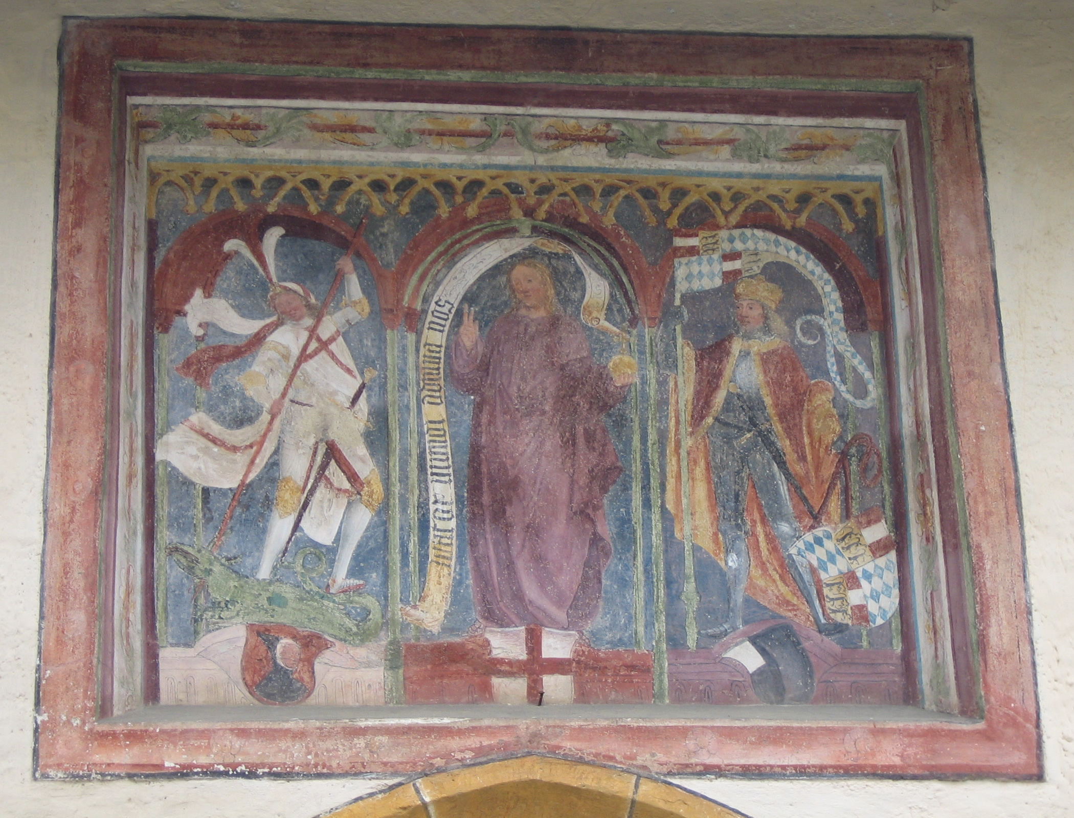 Fresko über dem Kirchhofportal der Stiftskirche in Millstatt Dargestellt sind der Heilige Georg (links) und der sagenhafte Herzog Domitian (rechts), dazwischen Christus Salvator. Entstanden ist das Fresko um 1490/1500, vermutlich aus der Schule von Thomas von Villach. Foto von user:Popie, April 2006